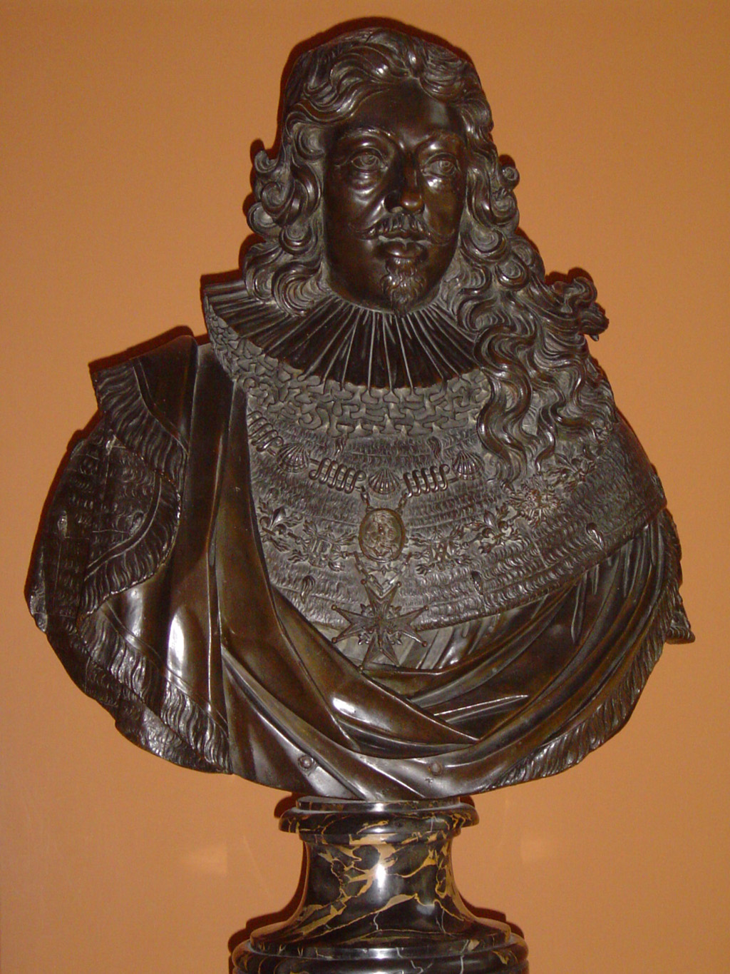 Louis XIII